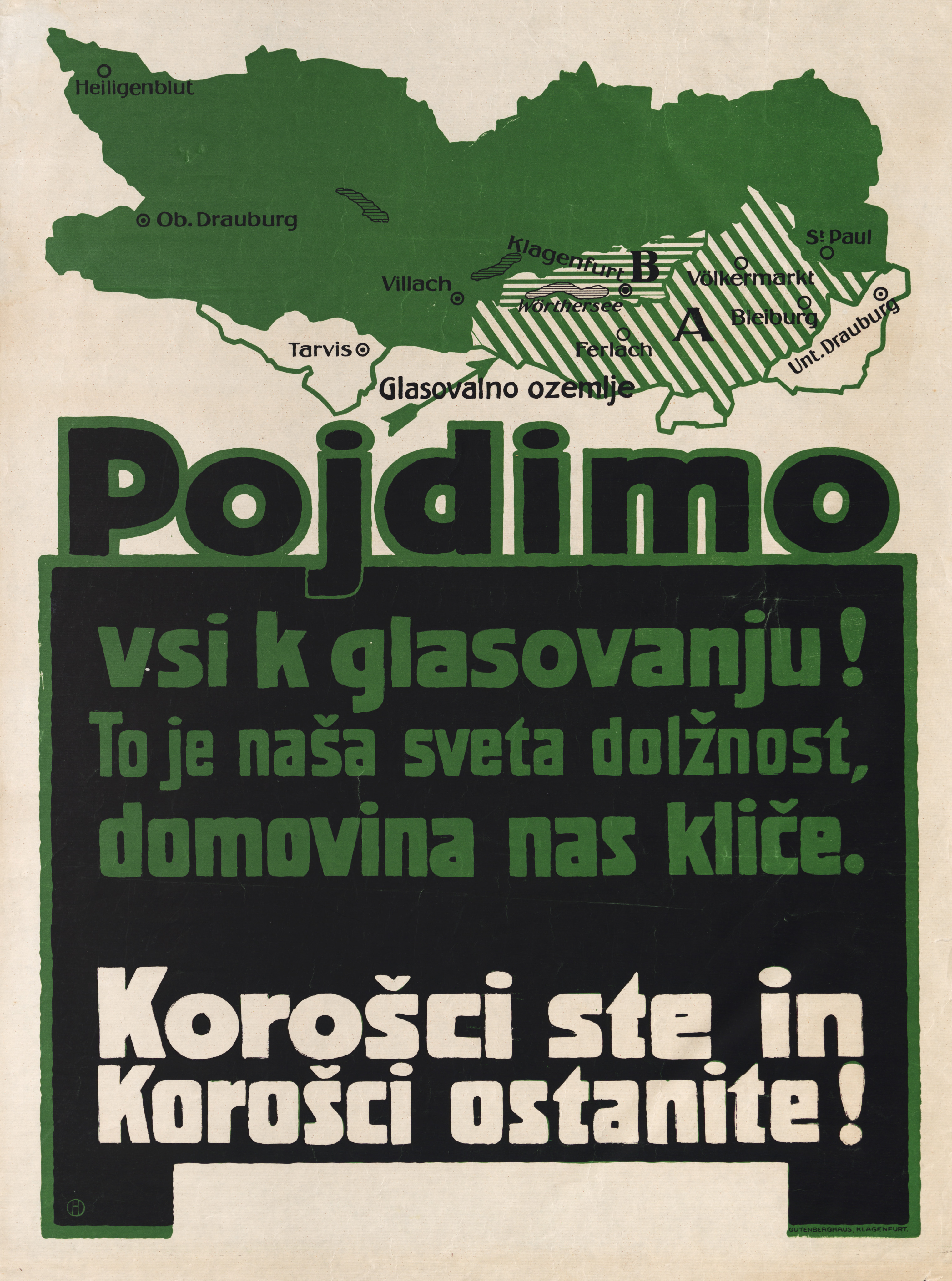 Plakat ob plebiscitu Pojdimo vsi k glasovanju! To je naša sveta dolžnost, domovina nas kliče. Korošci ste in Korošci ostanite